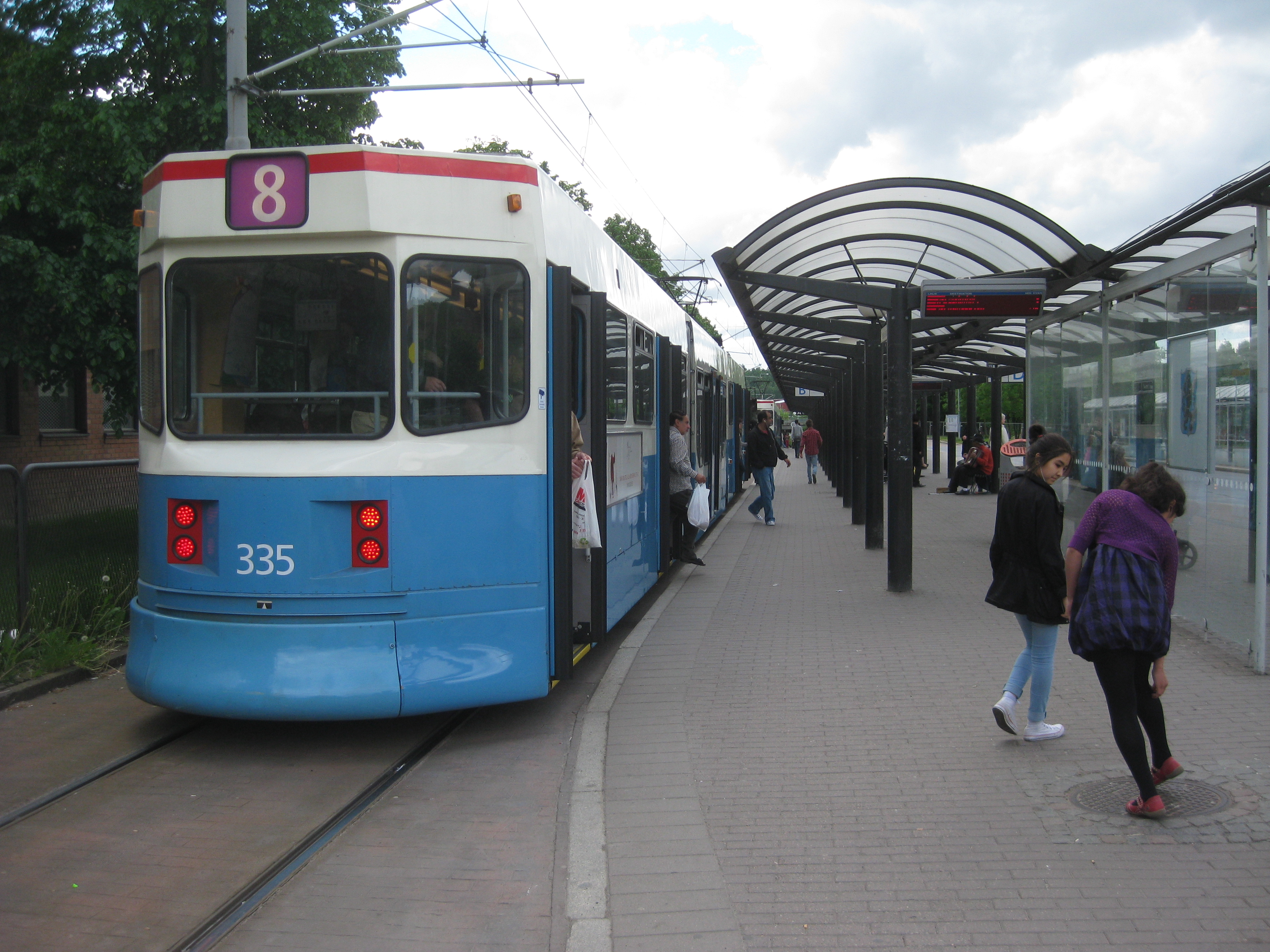 Angered Centrums spårvagnshållplats.